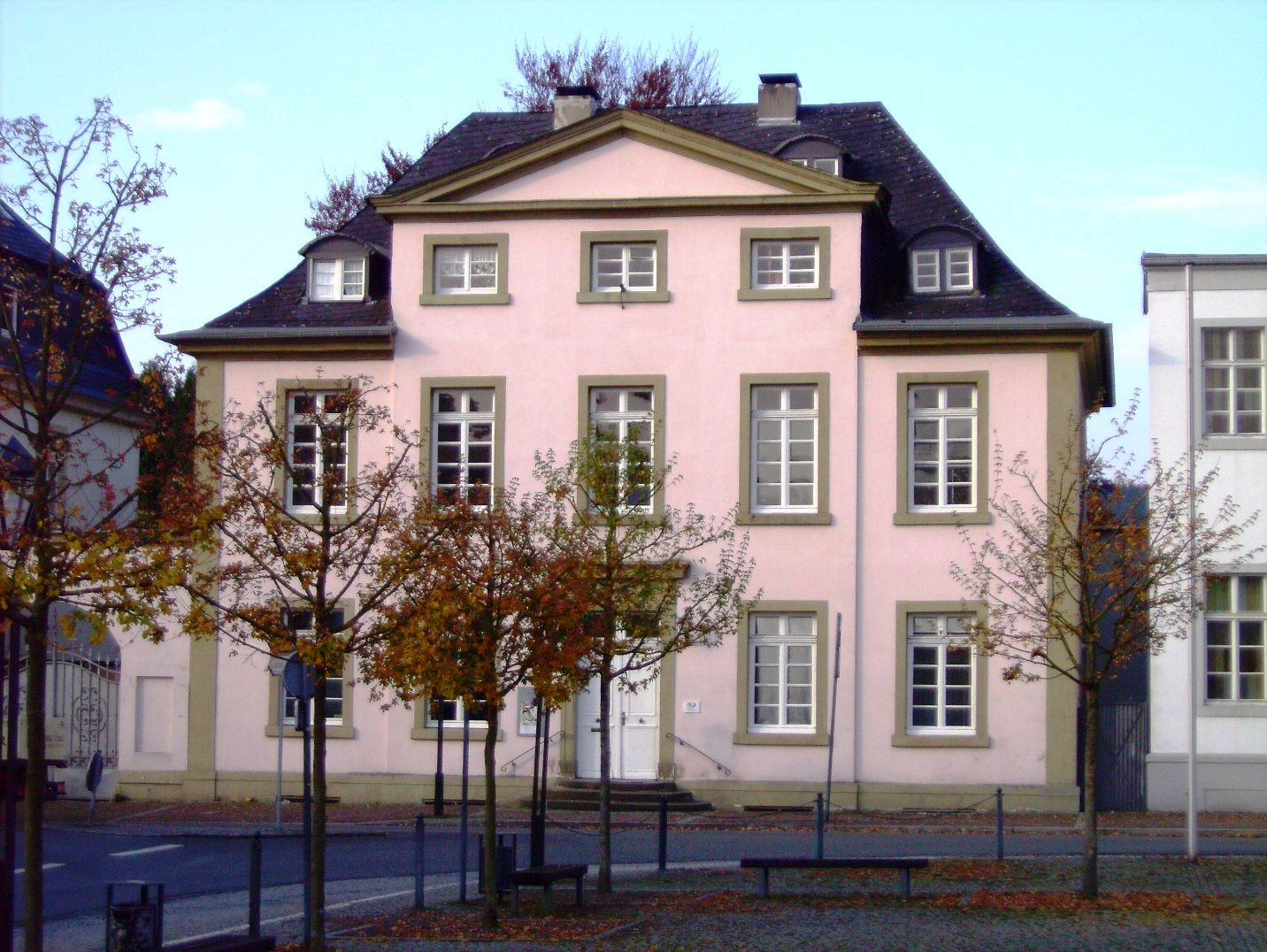 Klassizistisches Bürgerhaus am Neumarkt in Arnsberg, heute Sitz des Kunstvereins Arnsberg